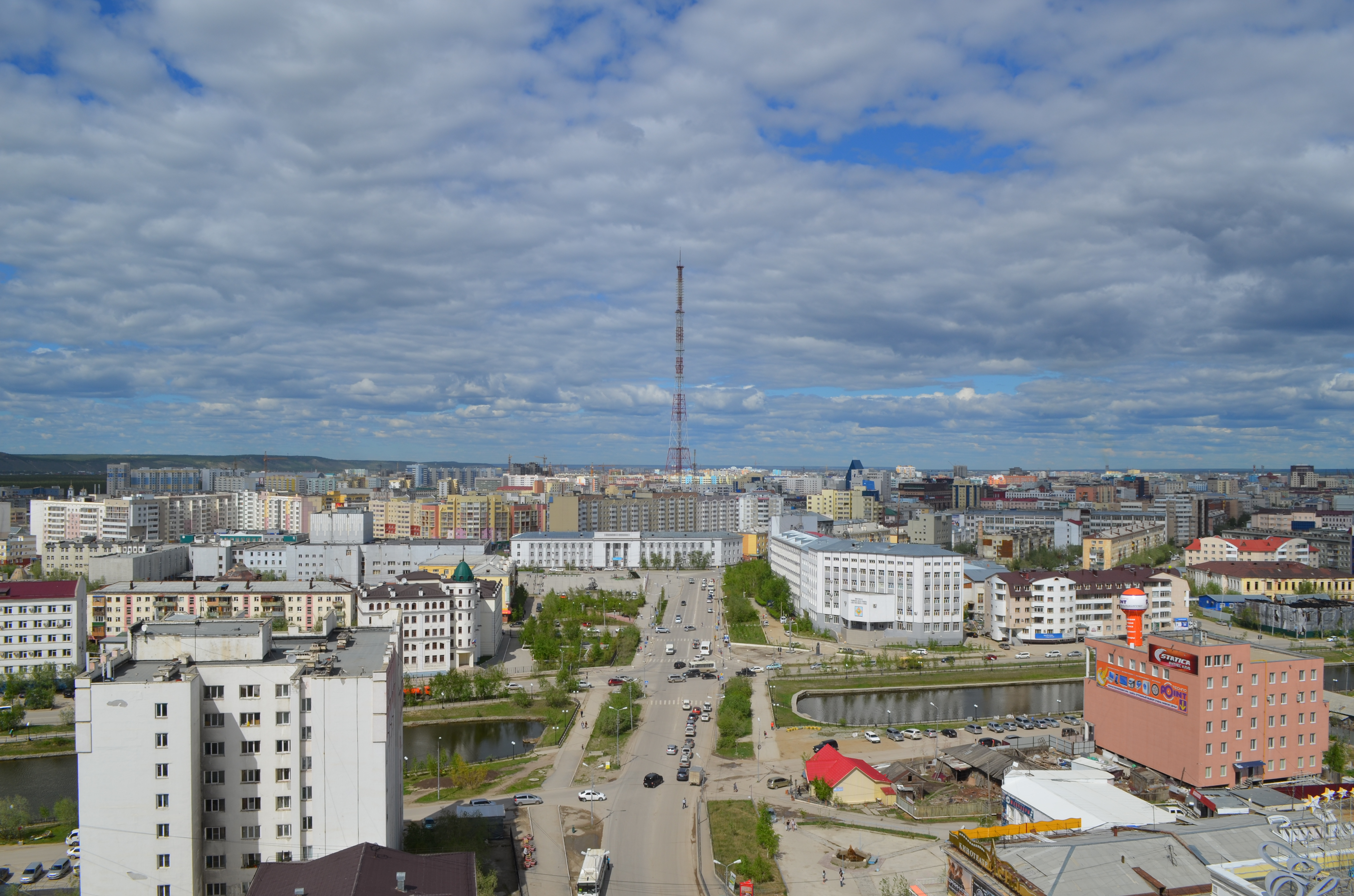 Вид на центральную часть Якутска с крыши 16-этажного здания по просп. Ленина, 52. Участок проспекта Ленина от кинотеатра "Лена" до здания ЯНЦ СО РАН. Видны: здание прокуратуры, театр оперы и балета, институт горного дела Севера, ТЦ "Эрэл", общежитие кооперативного техникума, телевышка, озеро Тёплое и др.